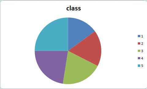 नेपाली: वृत चित्र pie